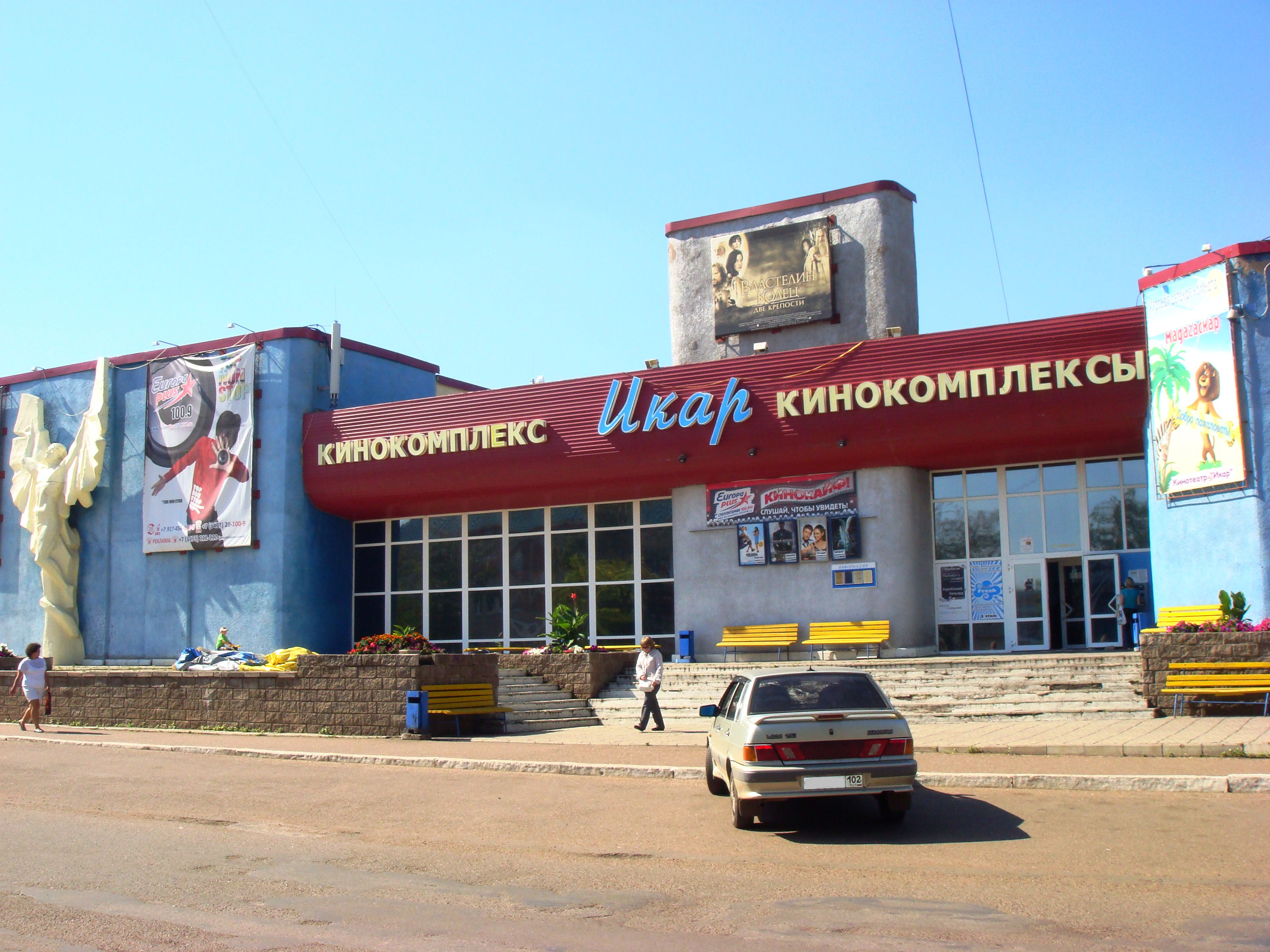 Кинотеатр "Икар" в Ишимбае